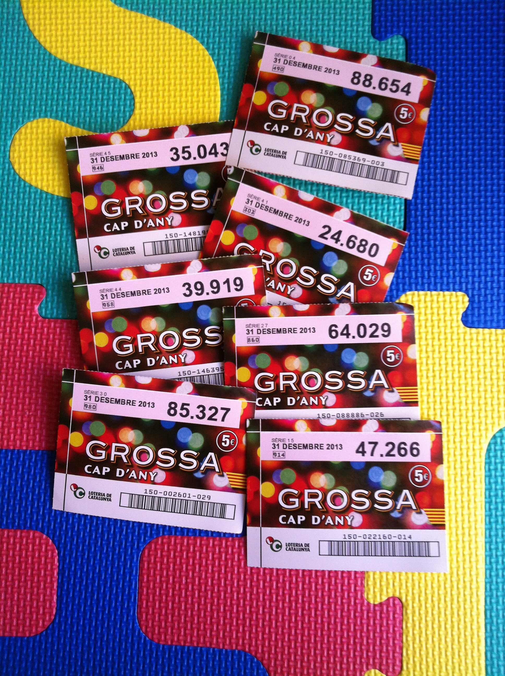 La Grossa 2013